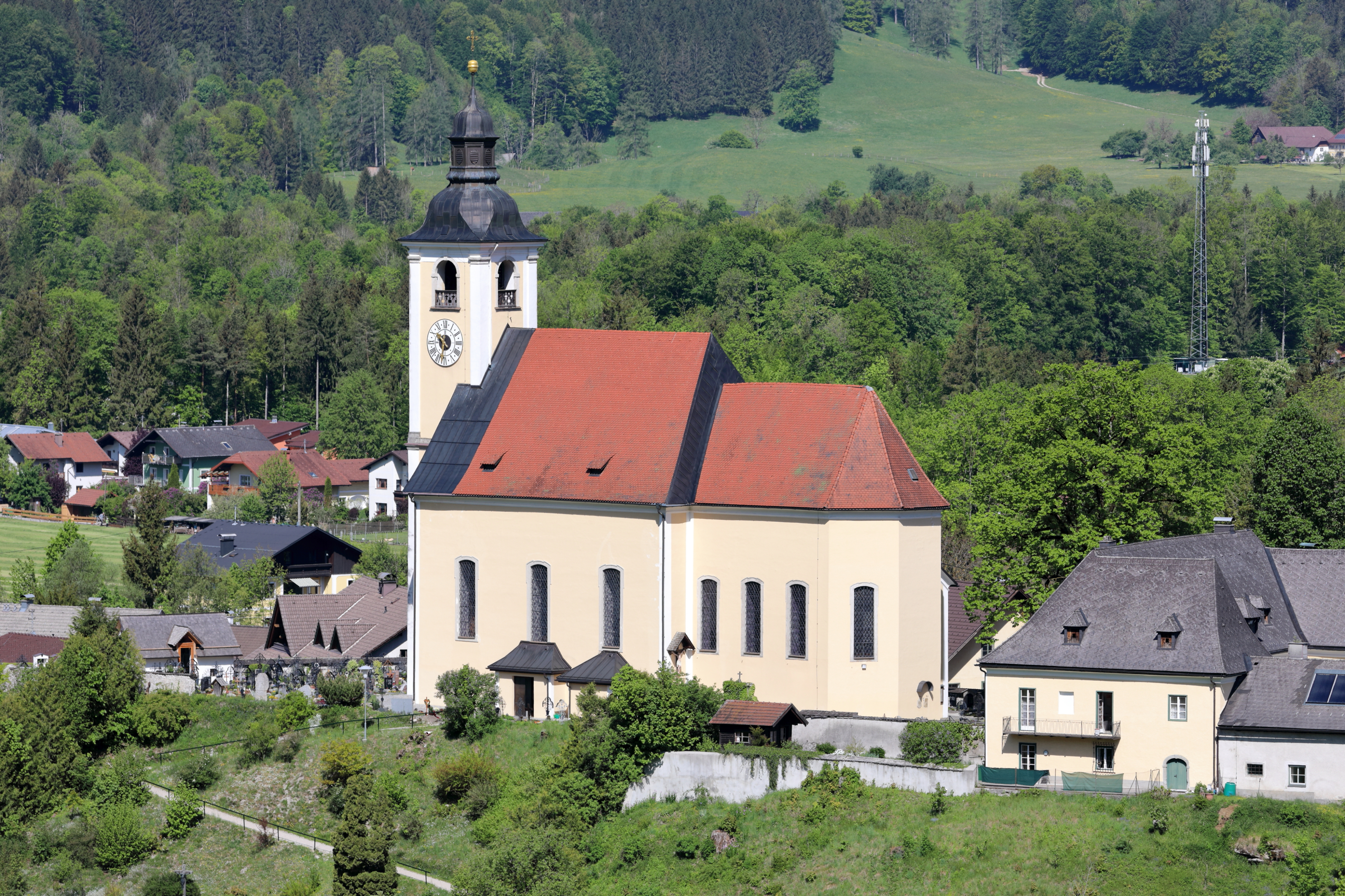 Südostansicht der röm.-kath. Pfarrkirche hl. Jakobus in der oberösterreichischen Gemeinde Grünau im Almtal.